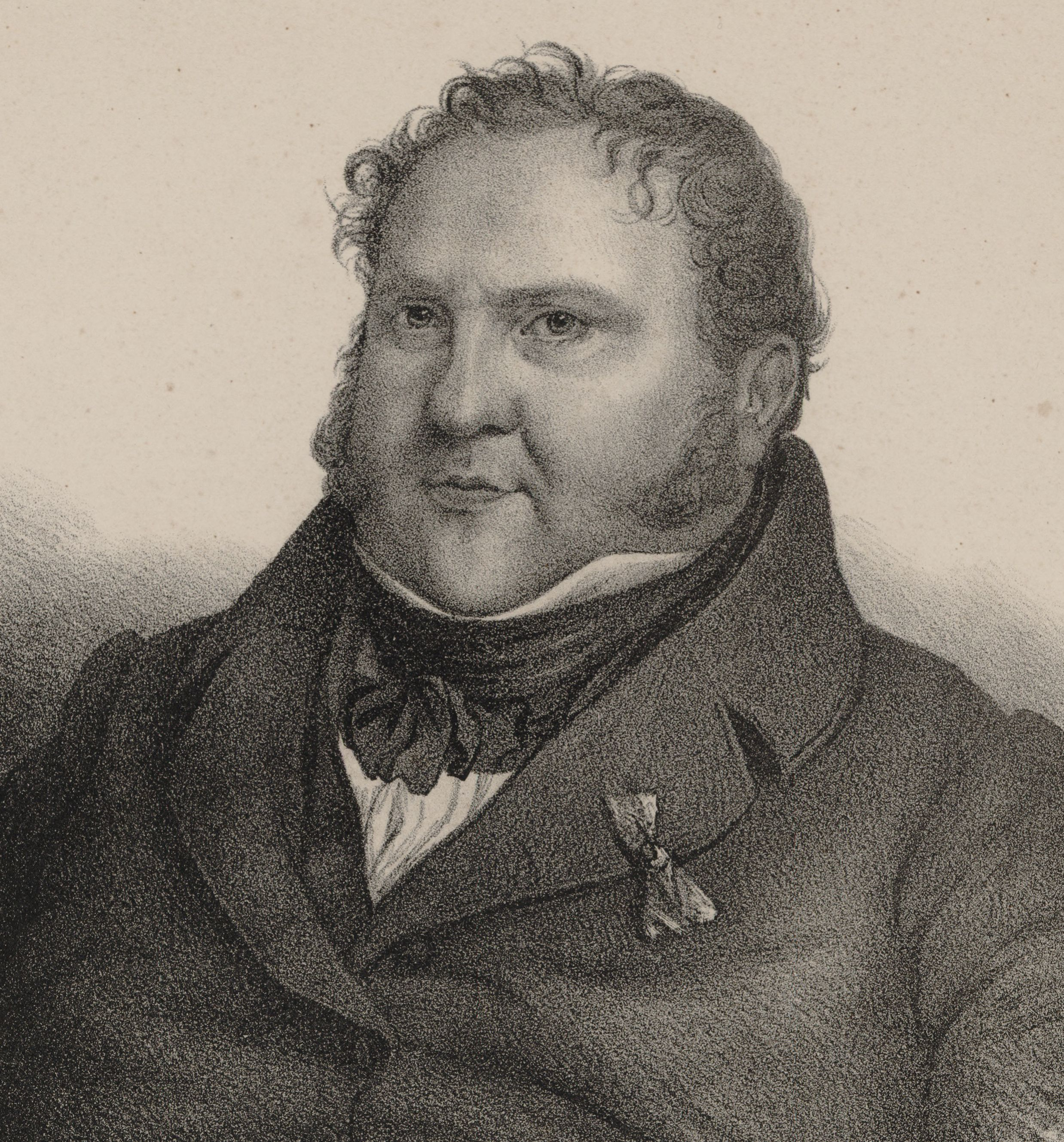 Portrait "d'après nature" de Frédéric Berr